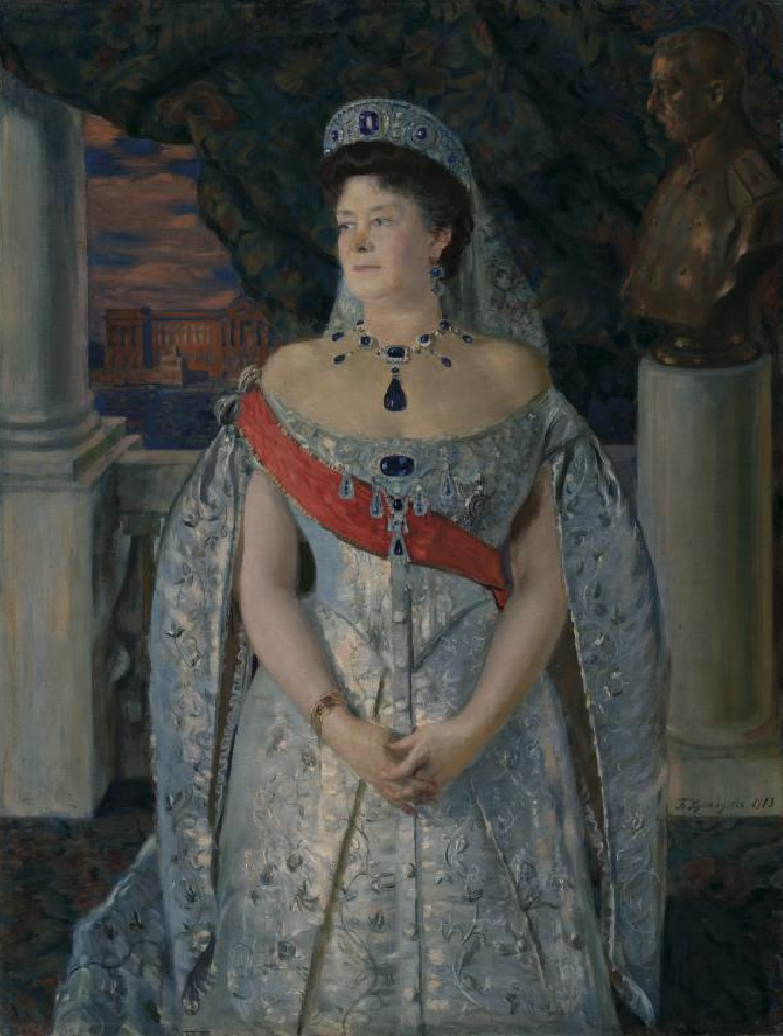 PORTRAIT OF GRAND DUCHESS MARIA PAVLOVNA THE ELDER